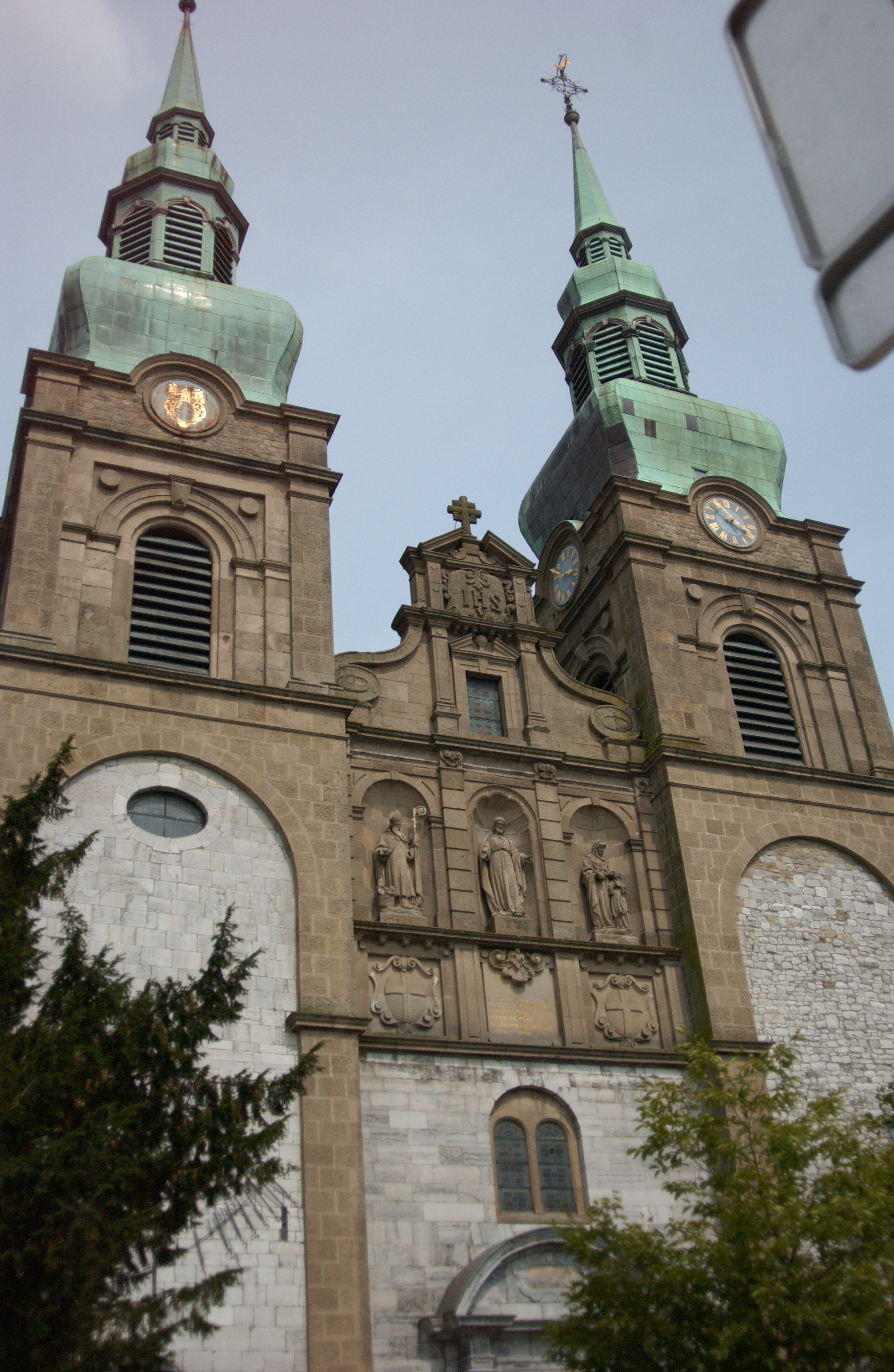 Église St-Nicolas